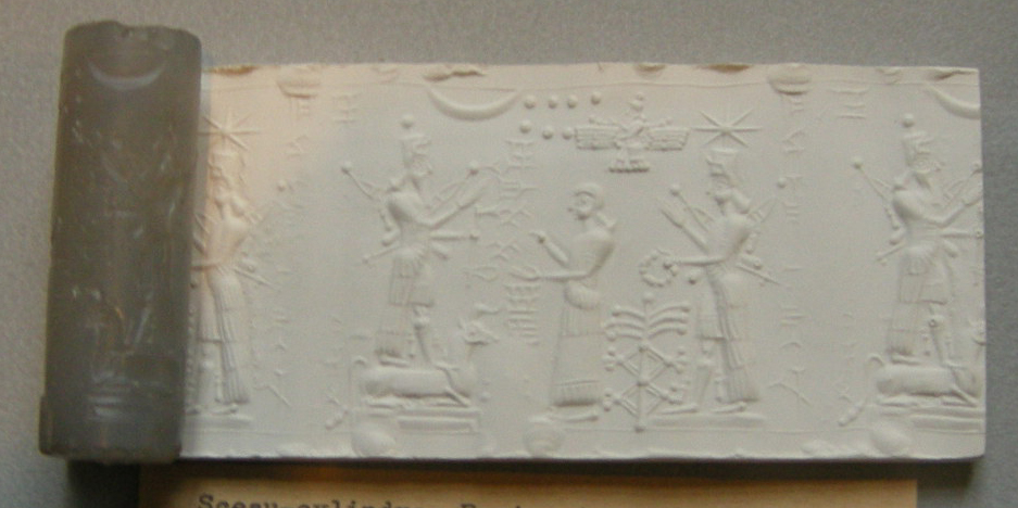 CdM, sigillo a cilindro assiro, culto a Adad e ishtar, 800 ac. circa, caldedonio 2